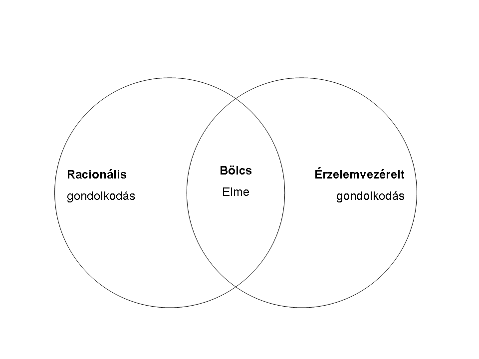 Dialektikus viselkedésterápiában a racionális gondolkodás és az érzelemvezérelt gondolkodás egyensúlya